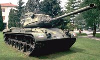 Carro M47